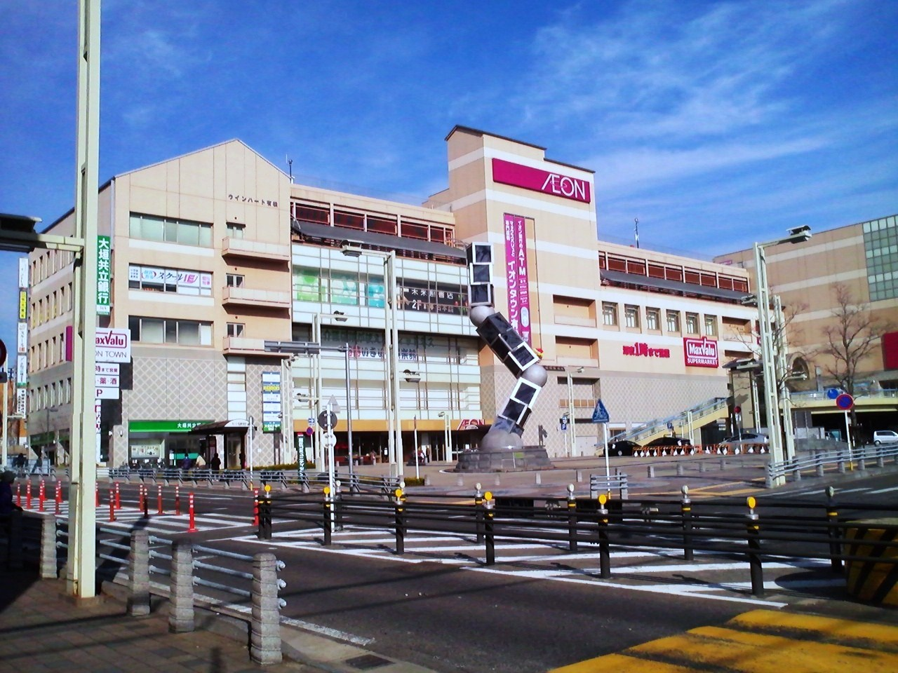 イオンタウン有松を撮影